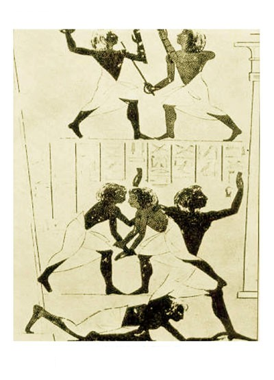 Représentation de Tahtib